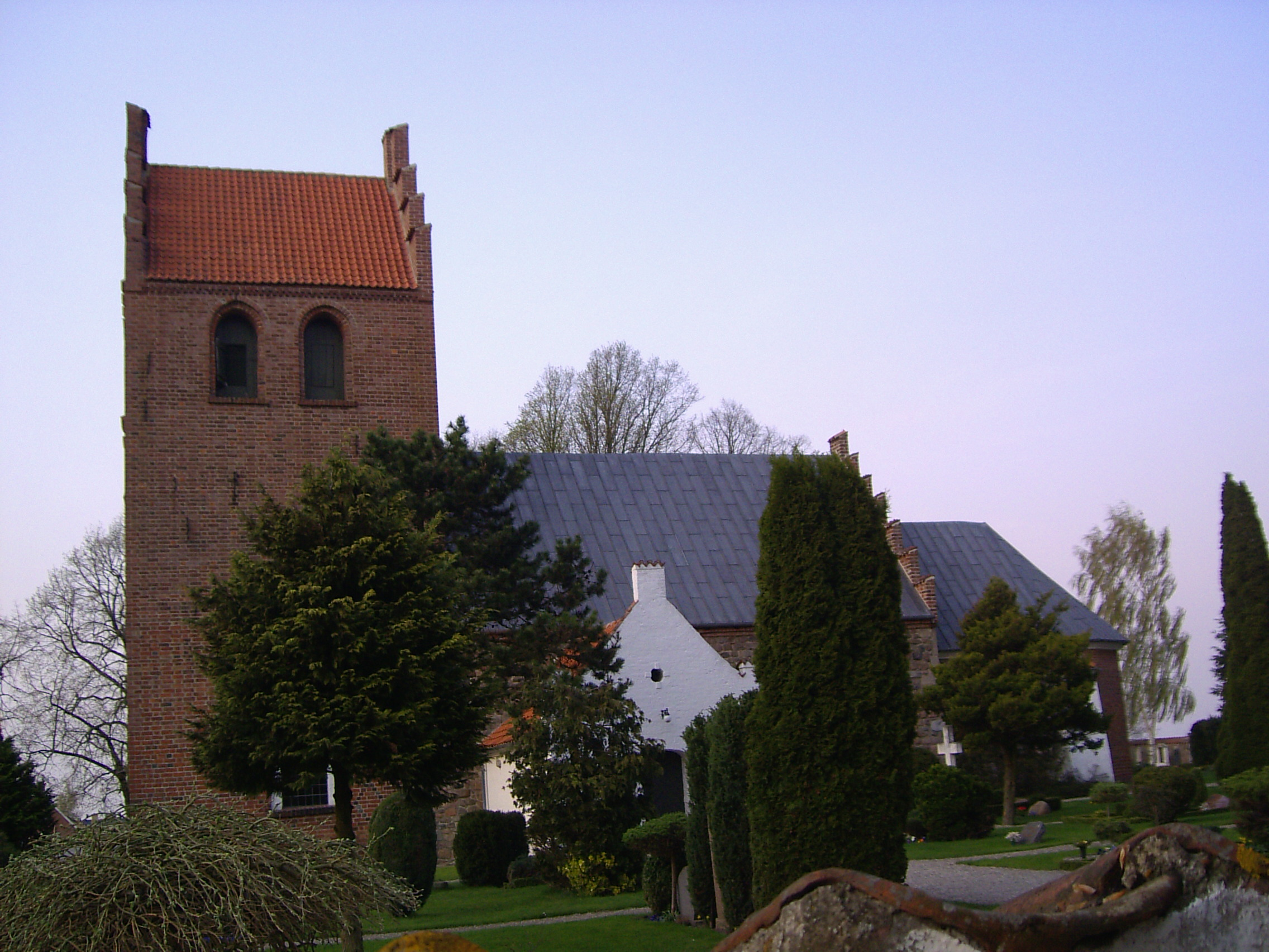 Strø kirke, Strø Sogn, Strø Herred, Frederiksborg Amt This file was made by User:Sir48.